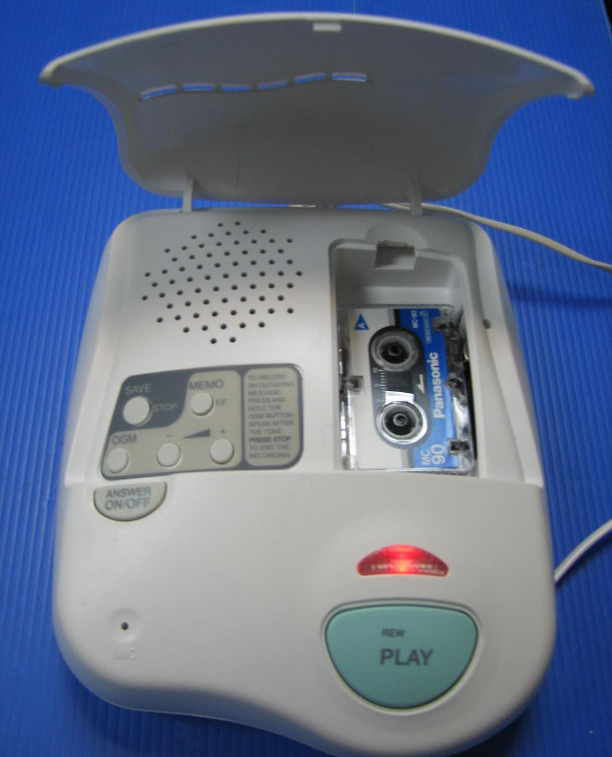 Автоответчик на одной микрокассете